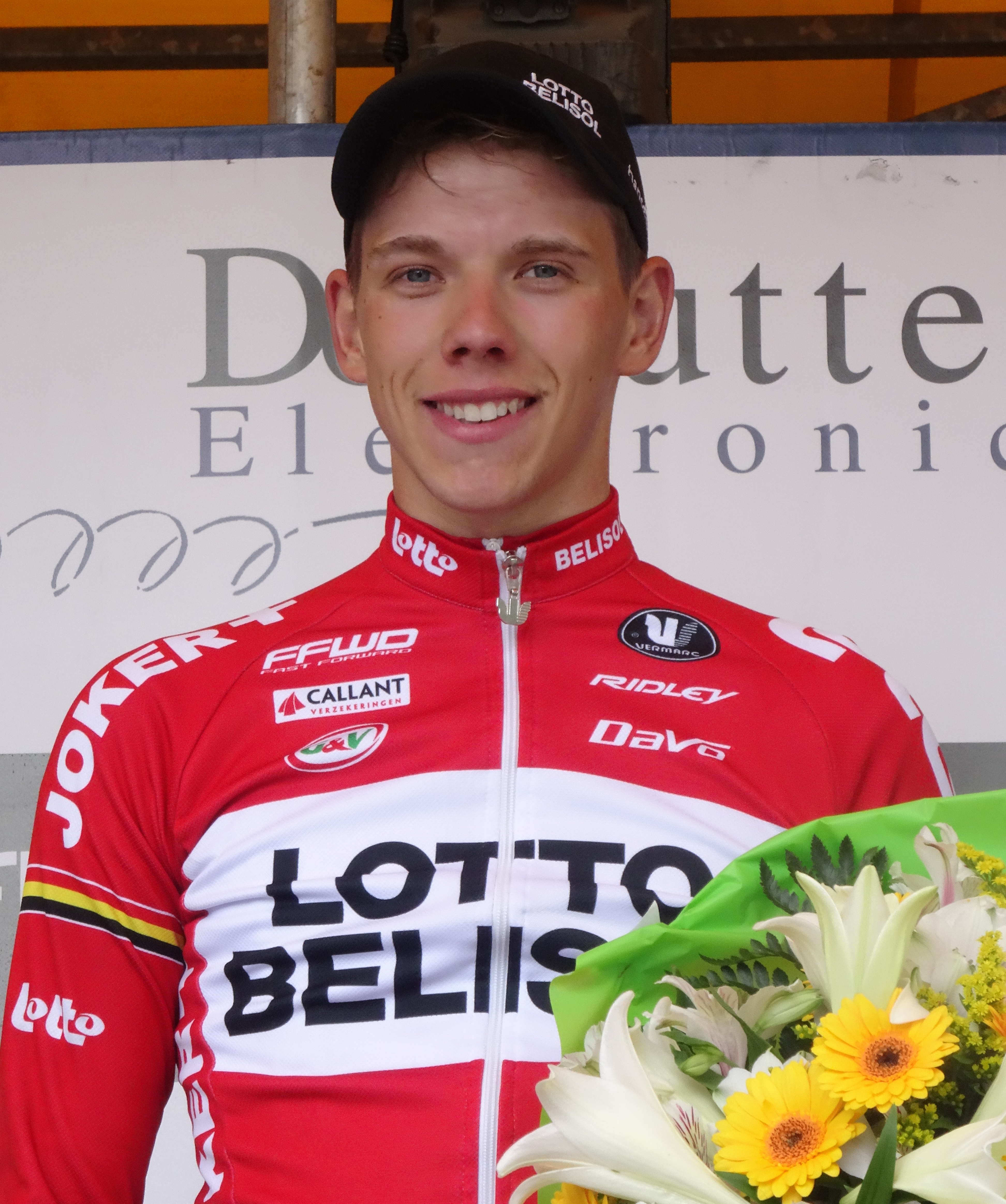 Reportage photographique réalisé le samedi 5 juillet à l'occasion du départ et de l'arrivée du Circuit Het Nieuwsblad espoirs 2014 à Grotenberge (Zottegem), Belgique.